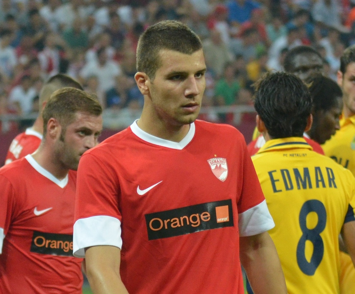 Marius Țucudean